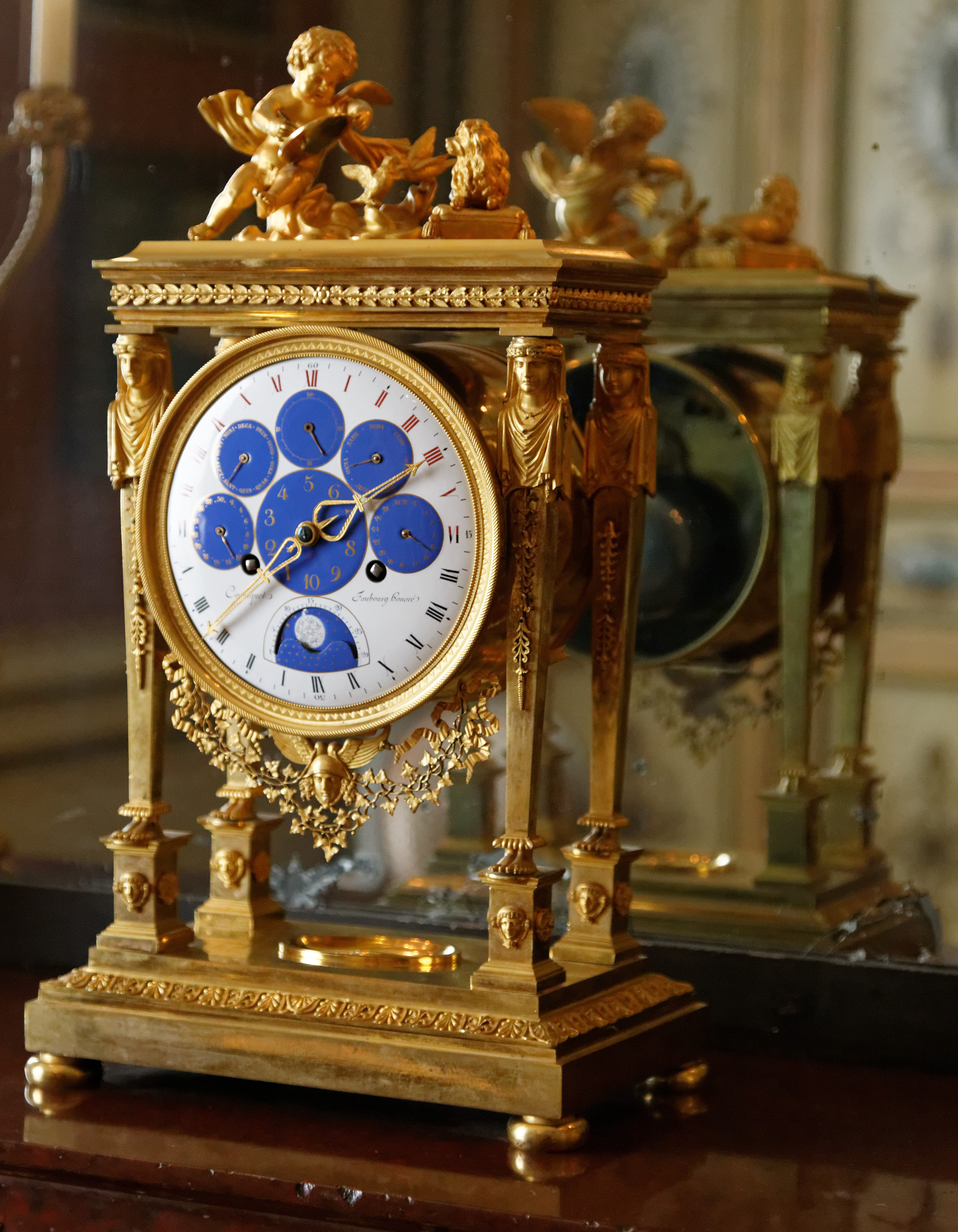 Horloge à heures duodécimales et décimales Philippe-Jacques Corniquet, maître horloger en 1785 Paris, vers 1794 bronze doré, cadran en émail Don Jules Audéoud, 1885 Inventaire 3130 Musée des Arts Décoratifs, Paris